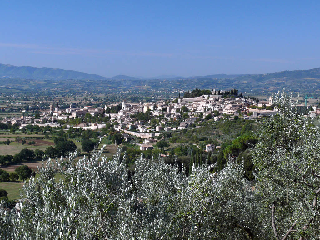 Spello, view